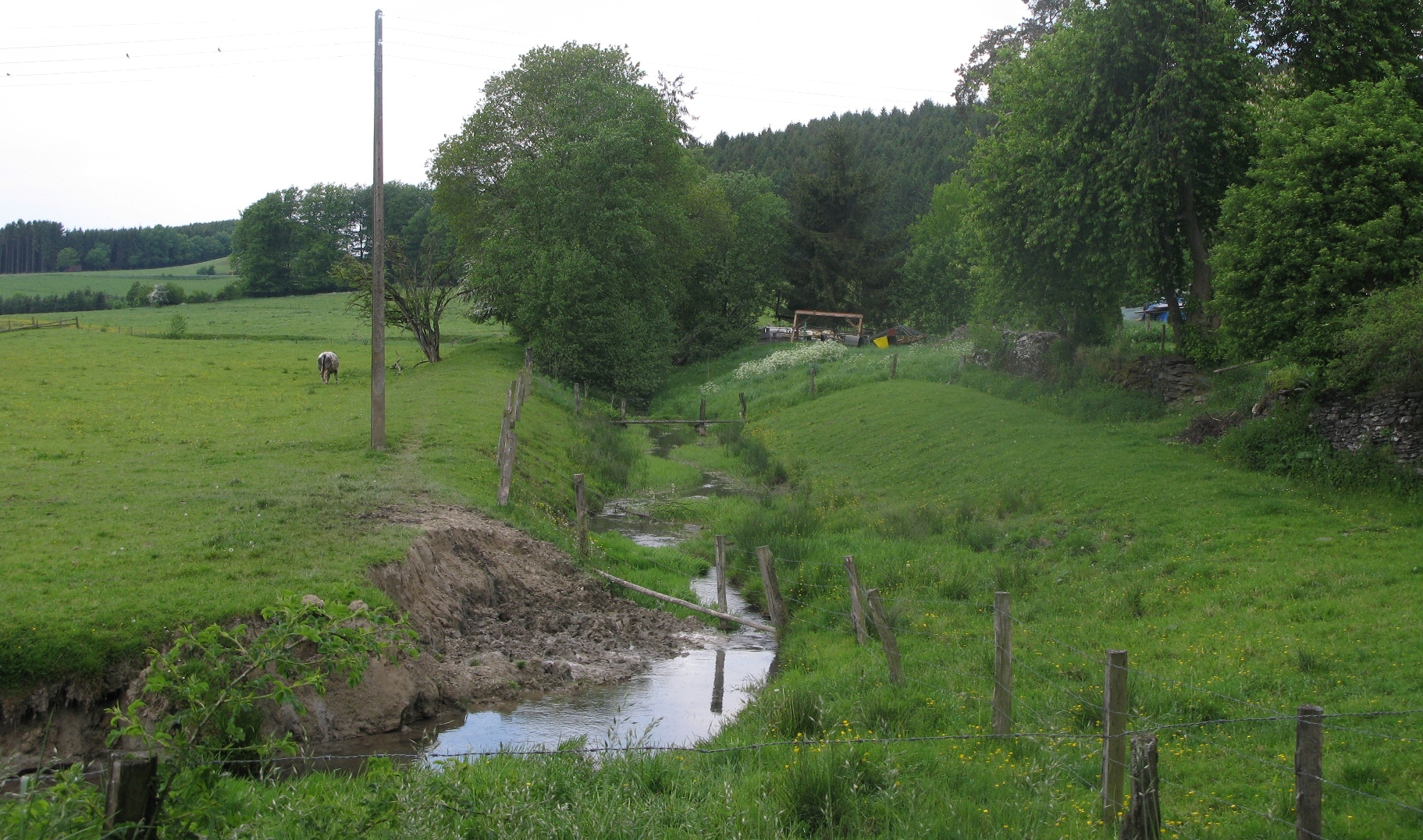 De Kanal zu Bernistap vun der Bréck flossof gekuckt. Meuse-Musel